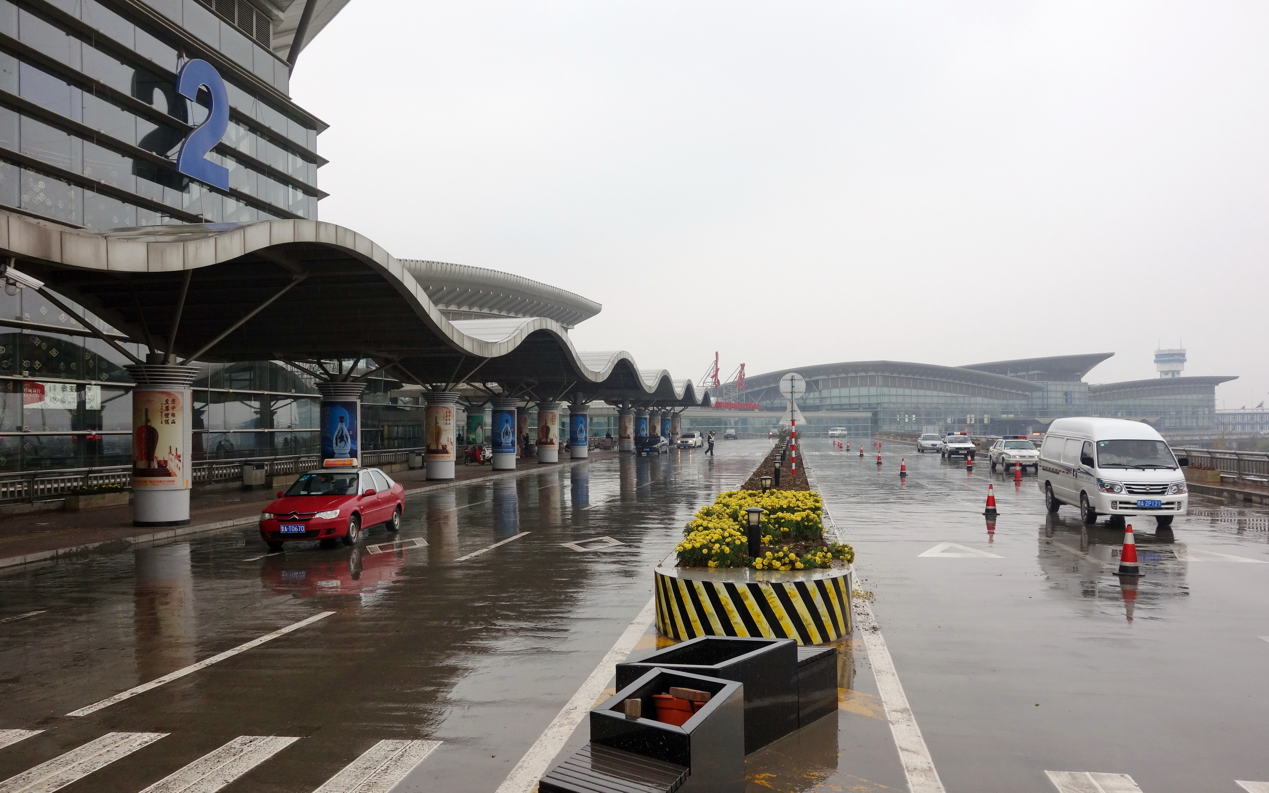 太原武宿国际机场航站楼